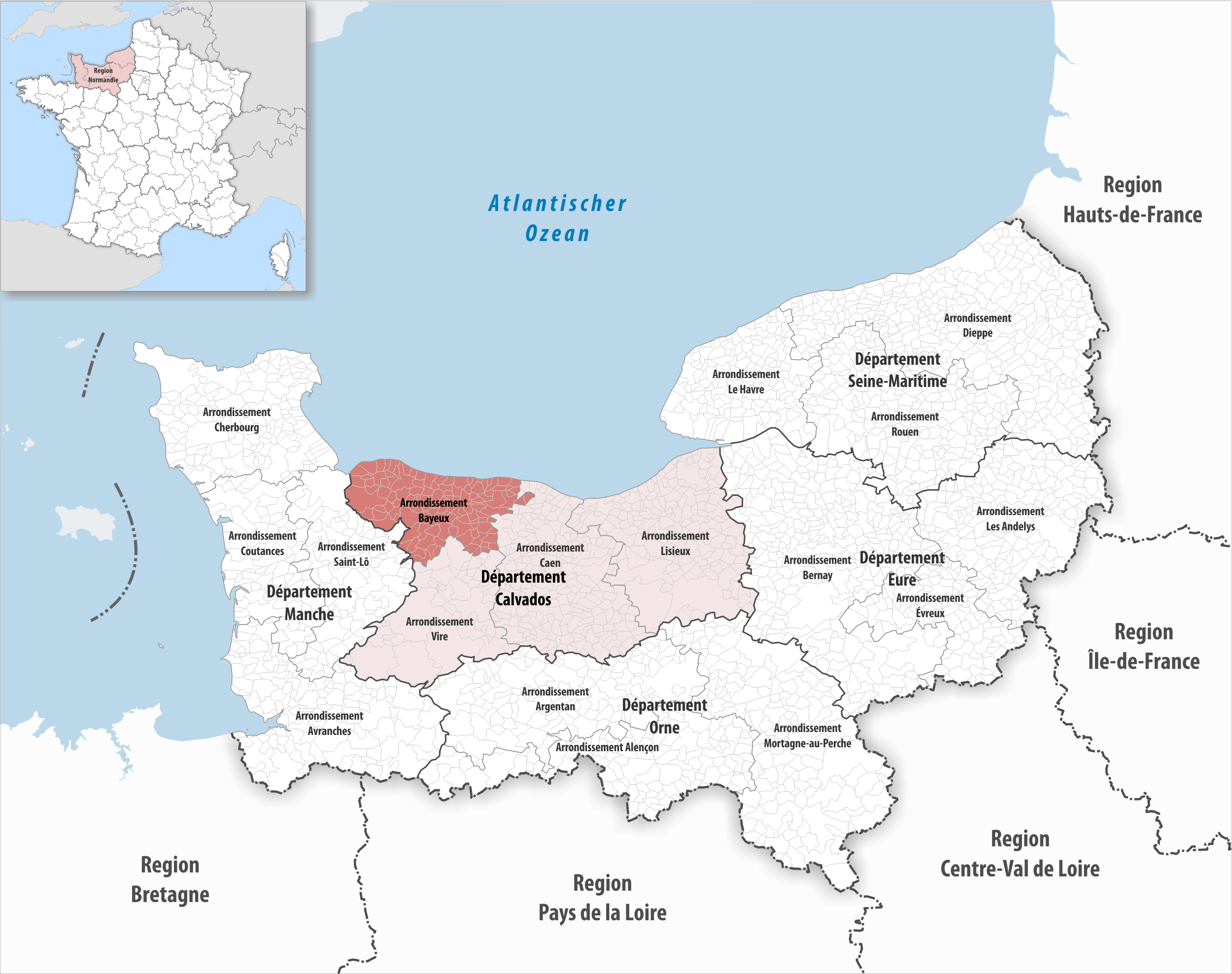 Lage des Arrondissements Bayeux